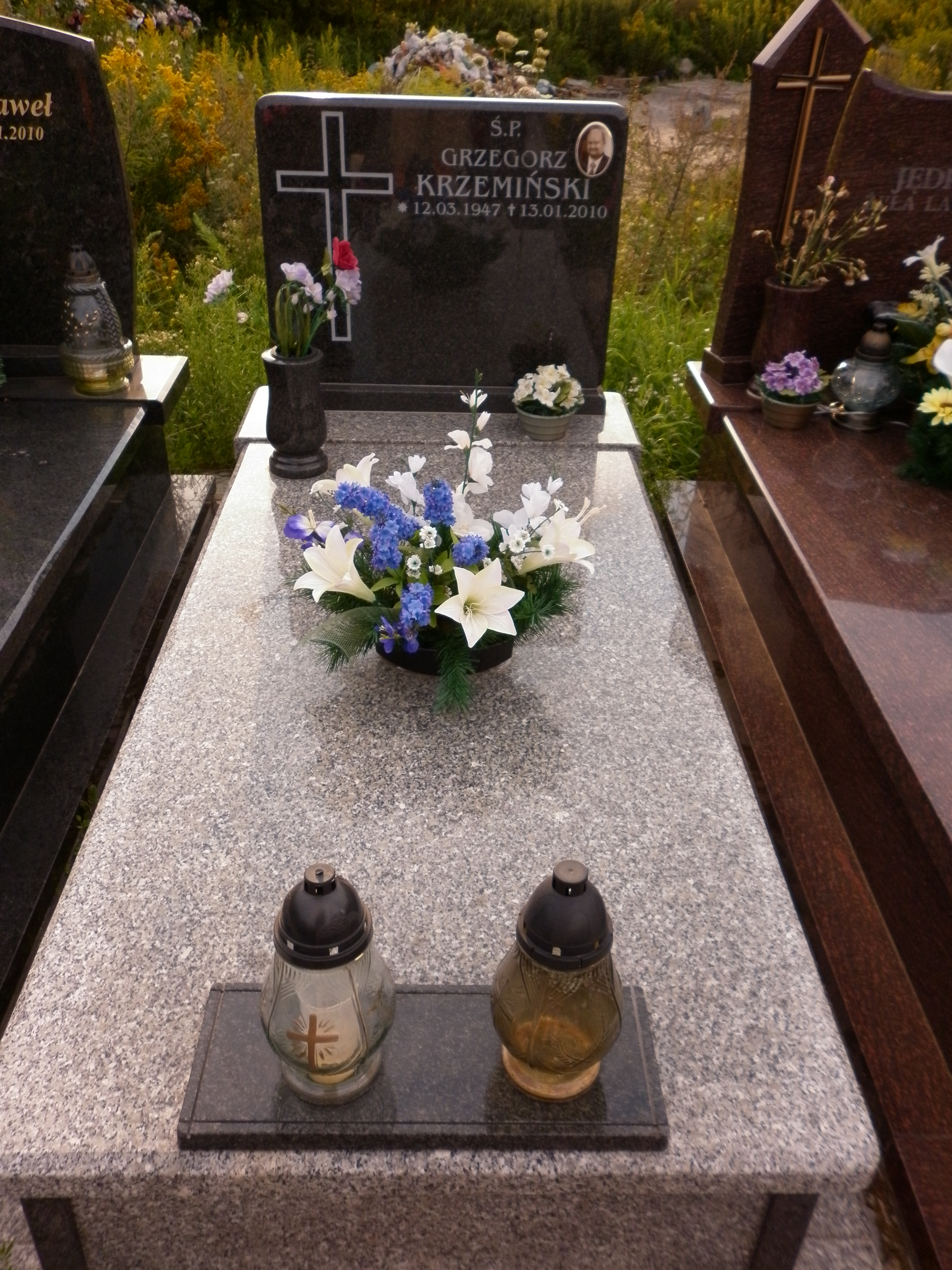 Grób Grzegorza Krzemińskiego na Cmentarzu Św Zofii Barat